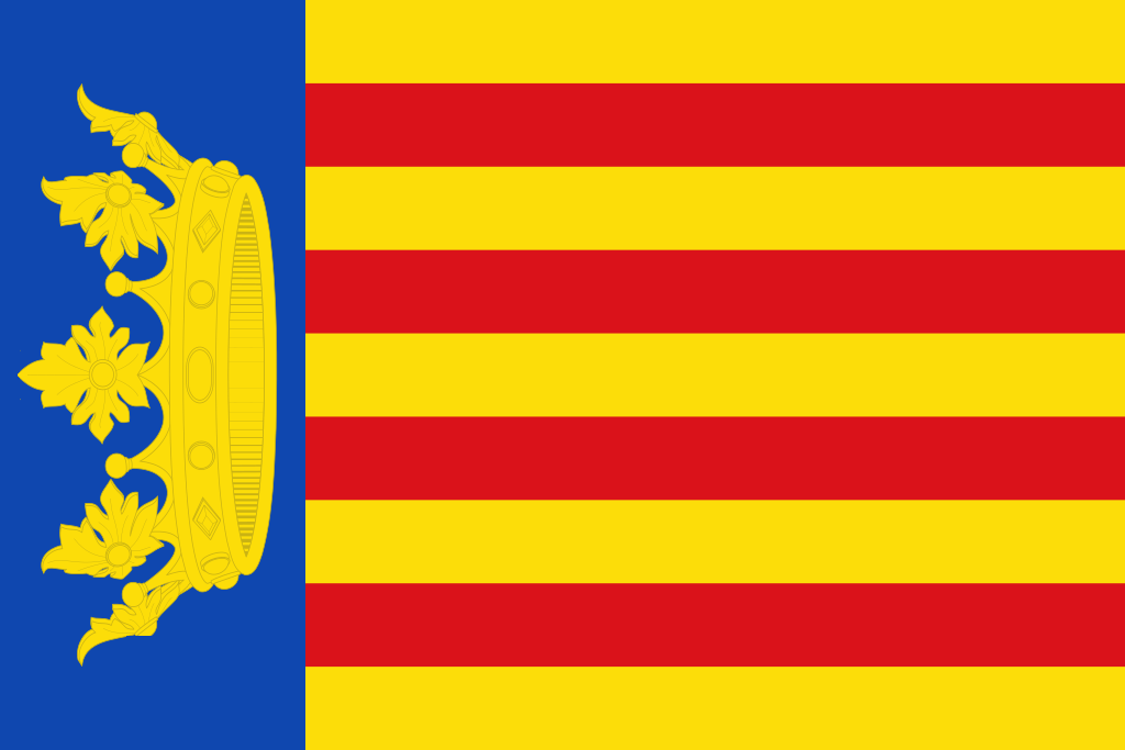 La imagen representa la bandera de la ciudad de Valencia desde sus inicios en el siglo XV hasta su modificación en el siglo XIX.